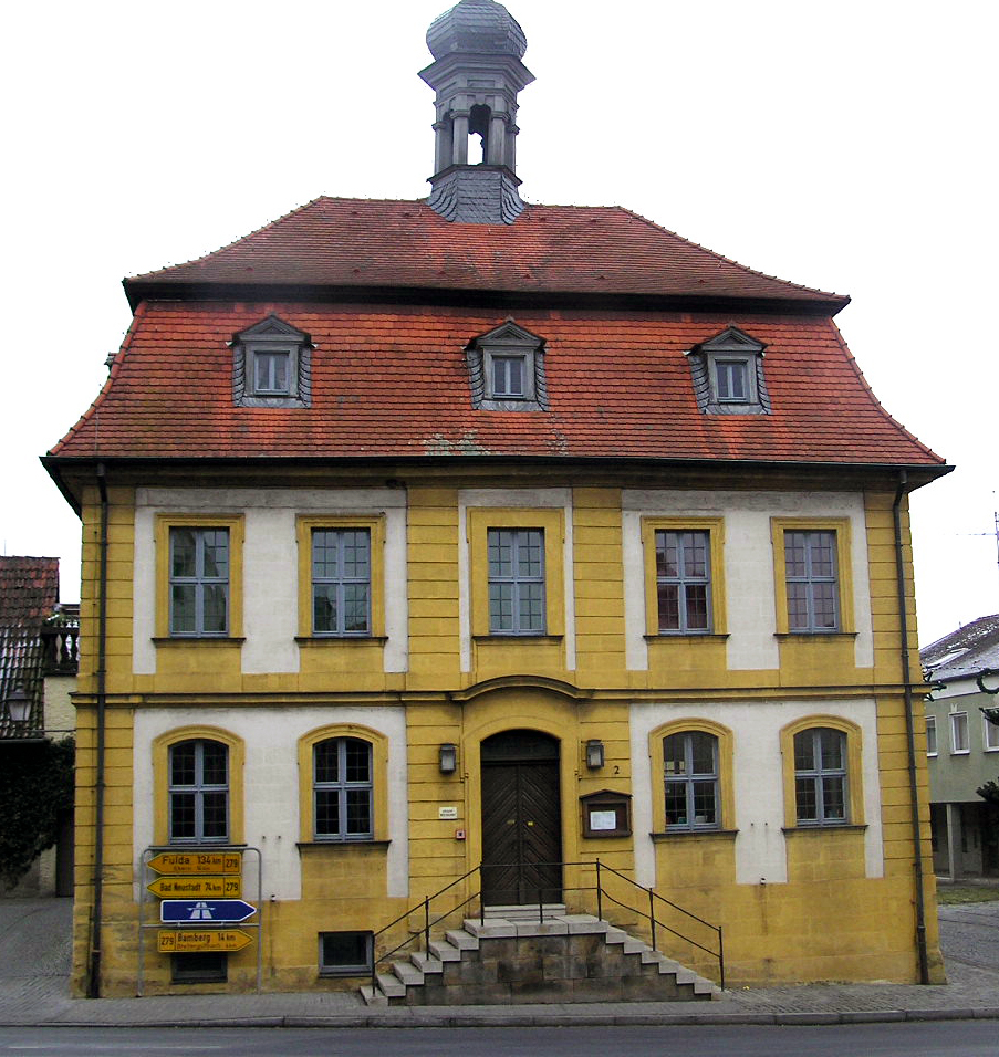 Baunach, Altes Rathaus